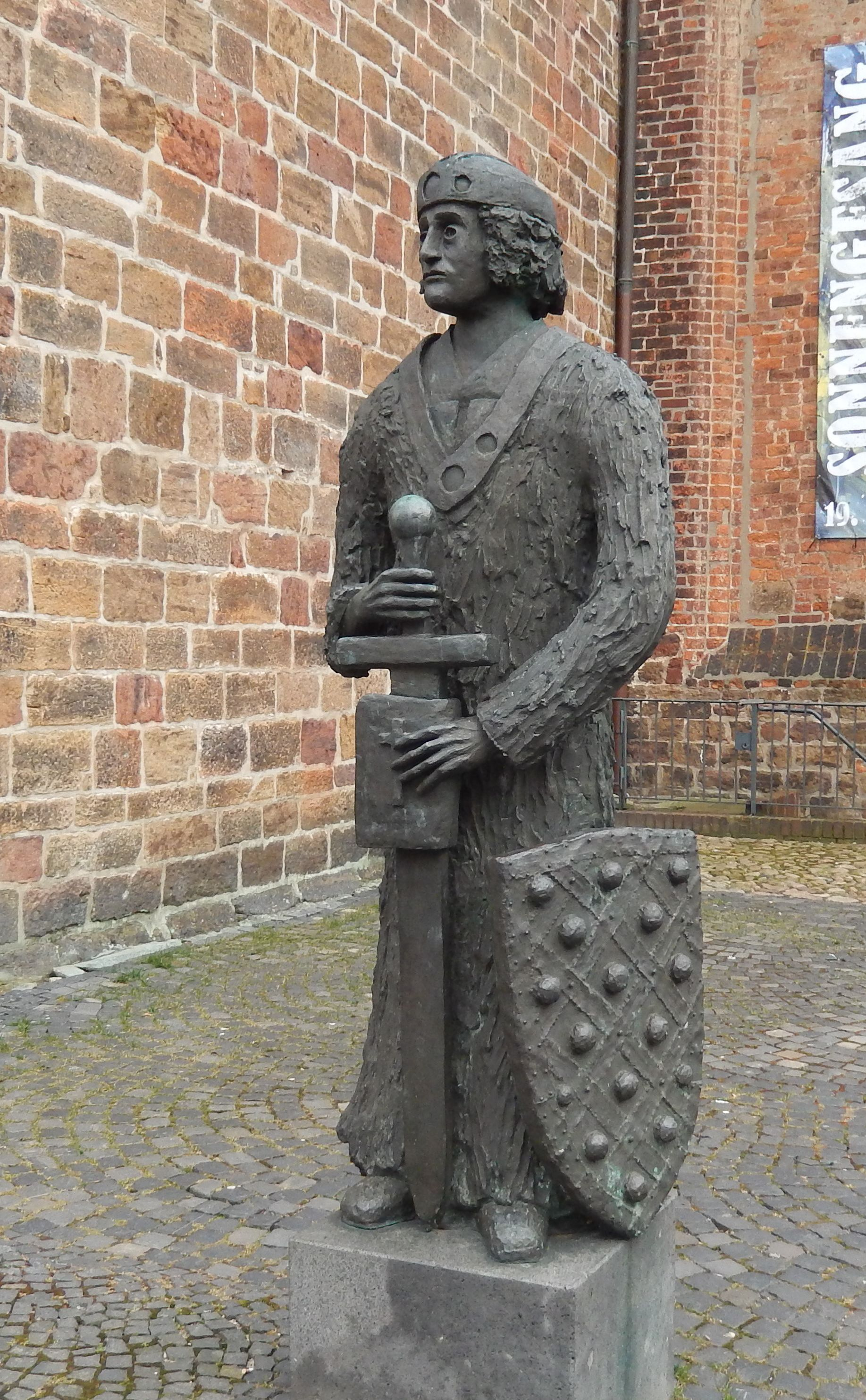 Skulptur in Nienburg/Weser